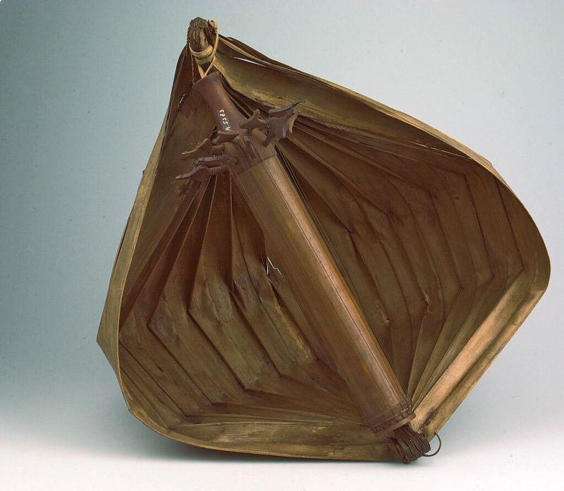 Tokkelinstrument. Buisciter van bamboe met klankkast van lontarblad Unknown language: Sasando